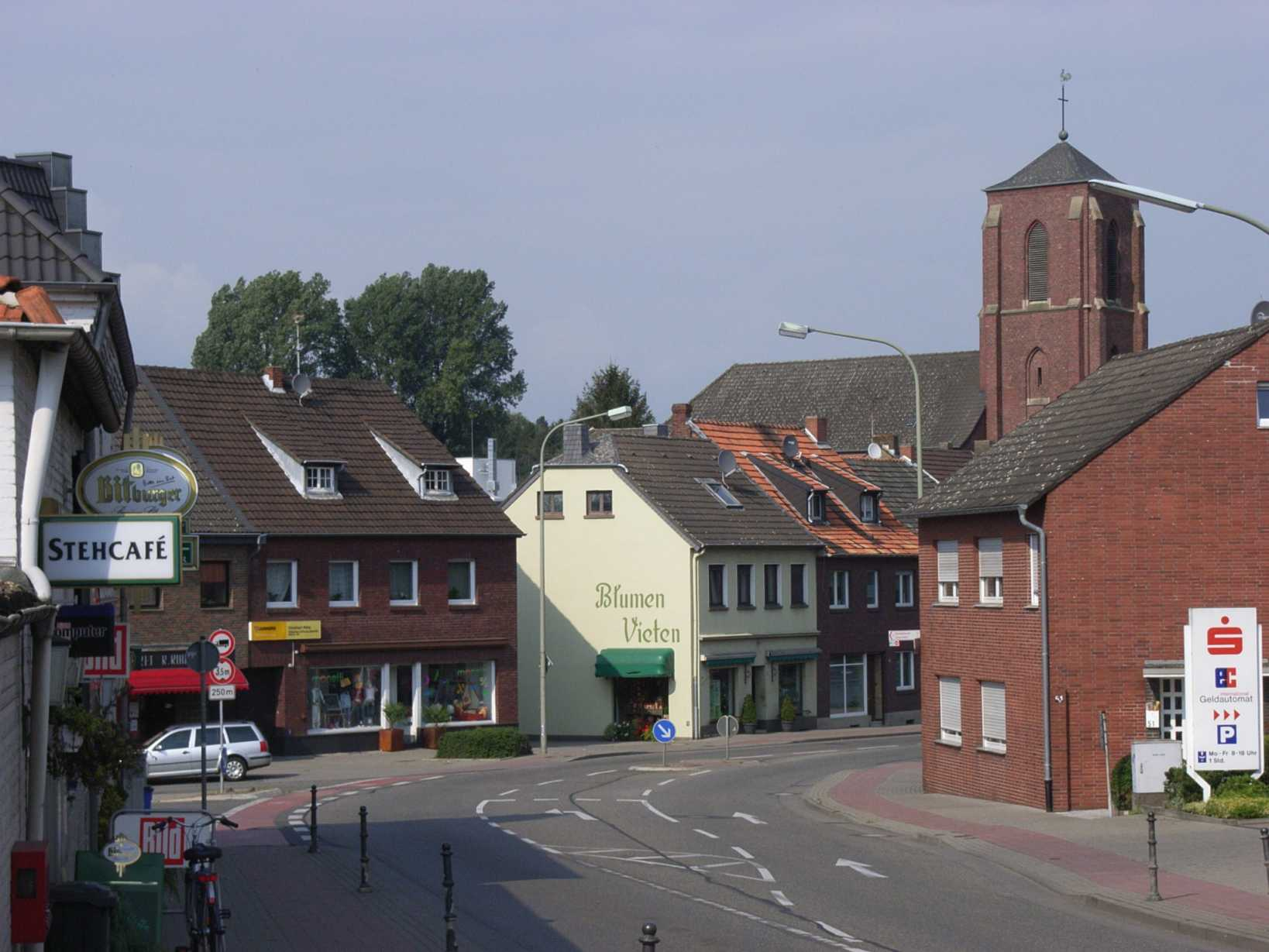 B57, kath. Kirche, Hückelhoven-Baal,NRW